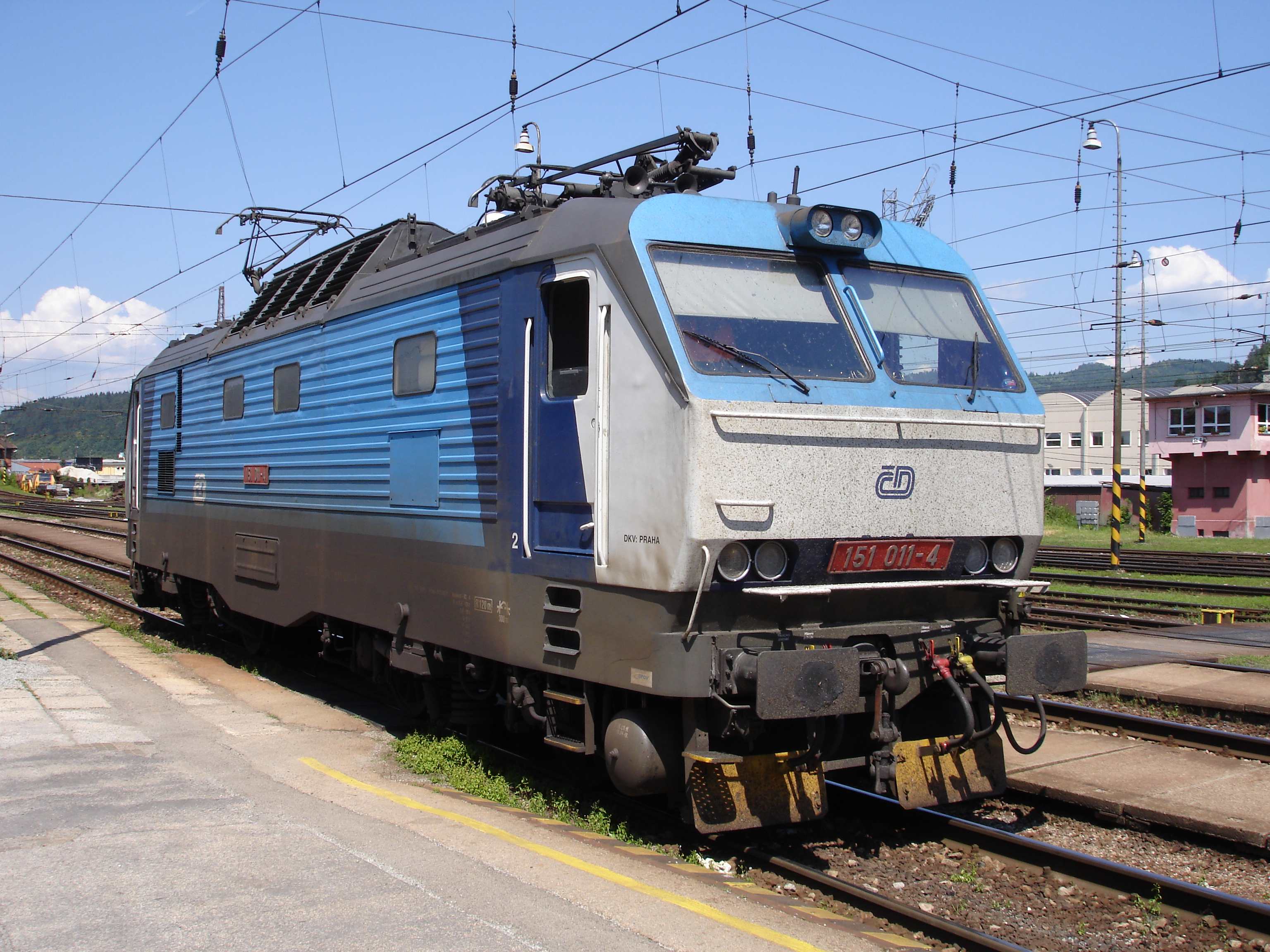 Elektrische Lokomotive der ČD-Baureihe 151 im Bahnhof Žilina, Slowakei